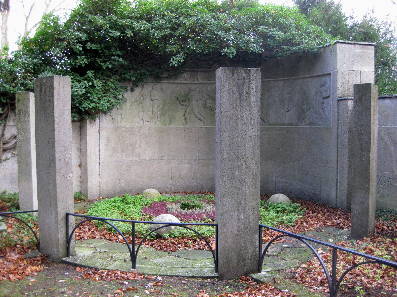 Grabstätte (Grabbezirk) der Familie Wieman auf dem Johannisfriedhof in Osnabrück. Hier wurden der Schriftsteller Bernard Wieman und dessen Neffe, der Schauspieler Mathias Wieman, beigesetzt. Die Grabanlage wurde von dem Architekten Erich Goßling errichtet; das Relief der Kreuztragung Christi stammt von Richard Engelmann